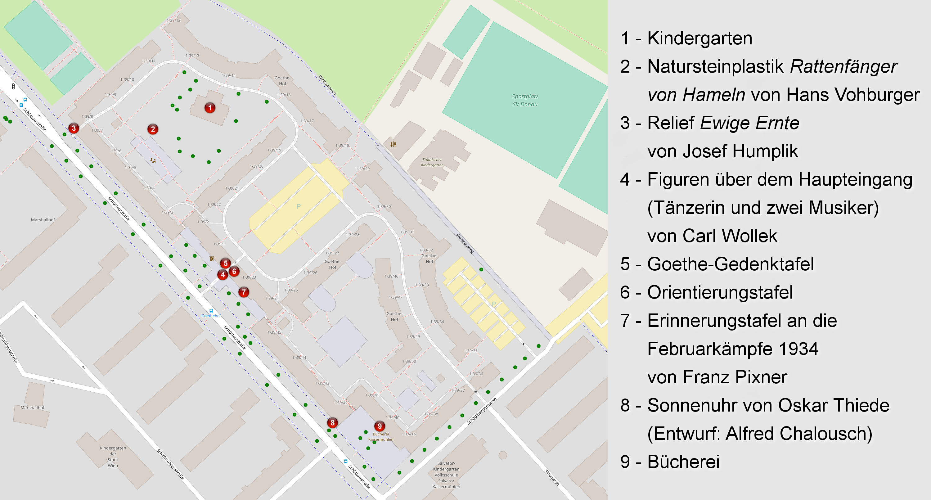 Goethehof in Wien, Übersichtsplan